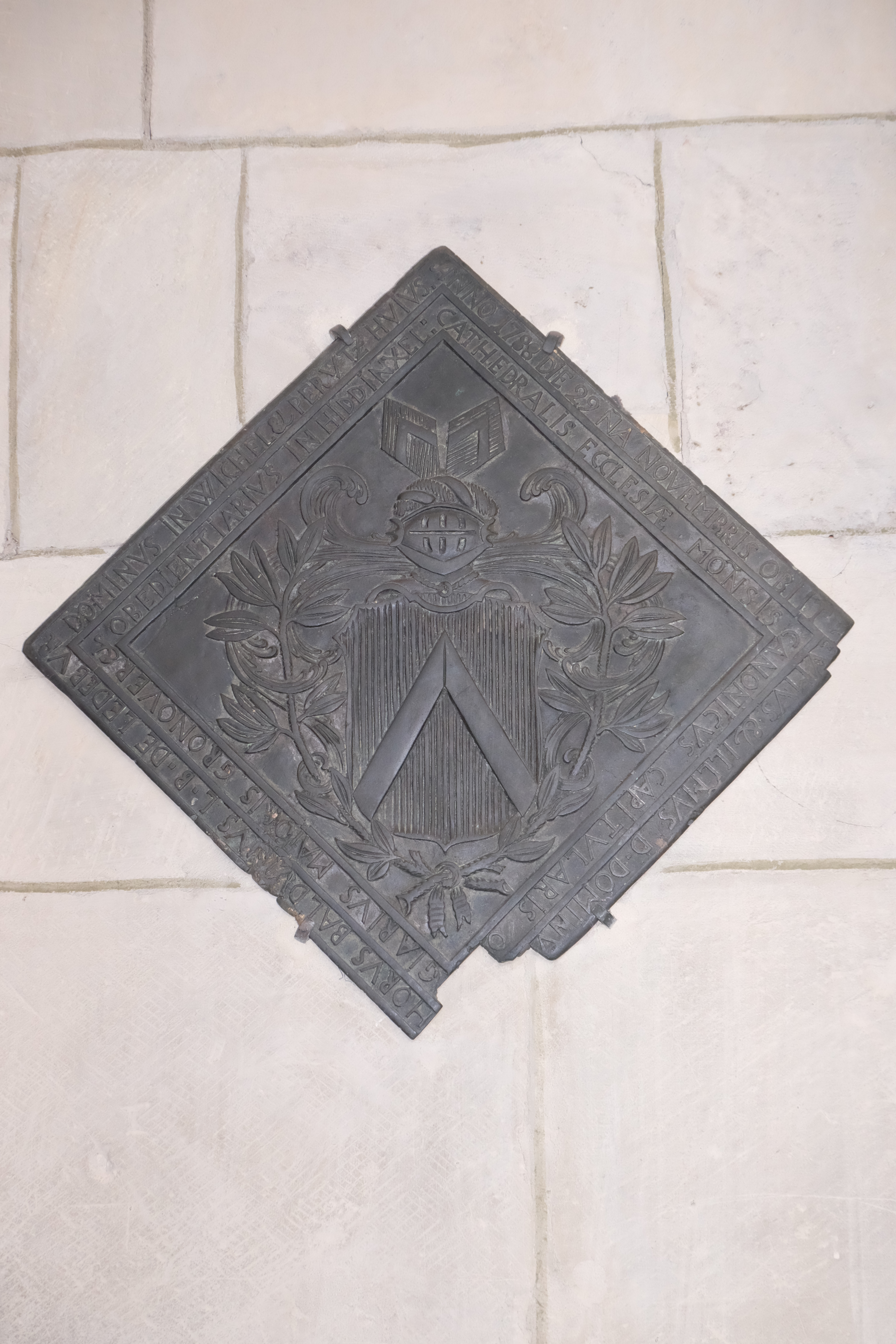 Wappen der Domherrn in Münster; Grabplatte von Christoph Balduin von Ledebur zu Wichel und Perutz